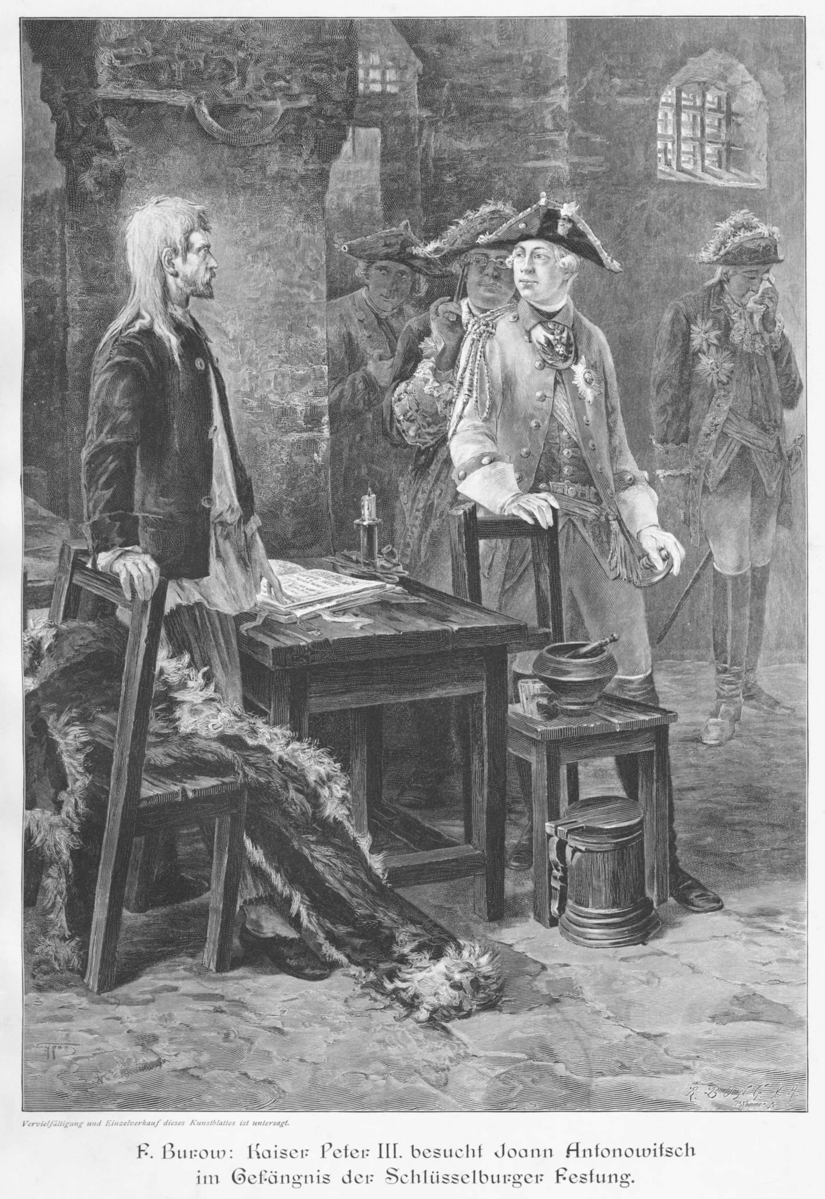 Kaiser Peter III. besucht Joann Antonowitsch im Gefängnis der Schlüsselburger Festung (Beschreibung lt. Quelle)